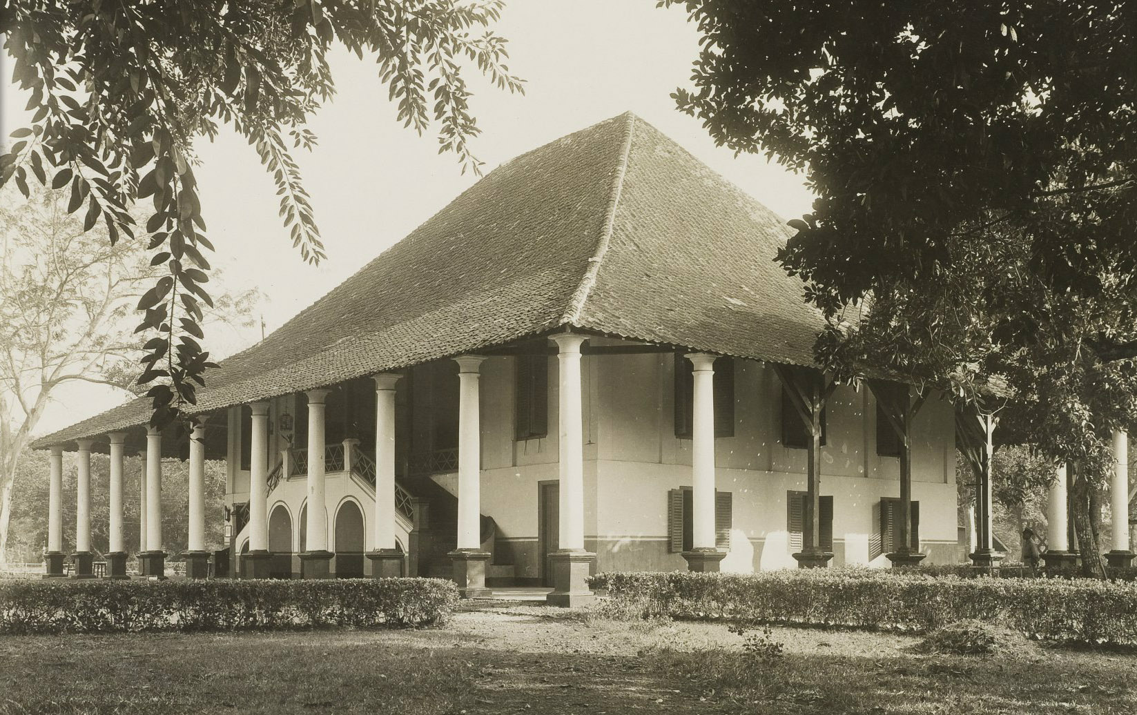 Title: Landhuis Tjililitan in Meester Cornelis te Batavia Image code: 106952 Description: 106952 Keywords: houses, Indonesia, Jakarta Raya Date: Circa 1930 Object type: Foto Technique: Ontwikkelgelatinezilverdruk (OGZ) Additional: Oude Hollandsche buitenplaatsen van Batavia / V.I. van de Wall. - Deventer : Van Hoeve, [1943]. - 2e verm. dr. - Oorspr. uitg.: 1931 o.d.t.: Indische landhuizen en hun geschiedenis OD 9889 Provenance: Onbekend Size: 12,5x17,5cm Old signature: 9732/11121/2.29.84